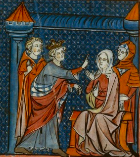 Baudouin III sermonnant Mélissende